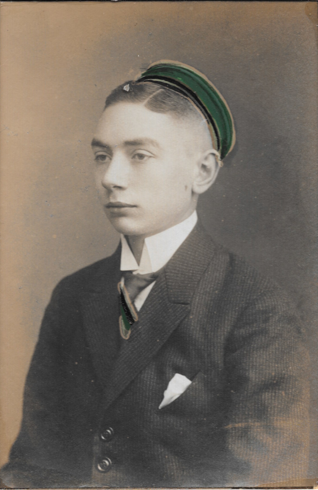 Kurt Traenckner Porträt des Corps Teutonia-Hercynia